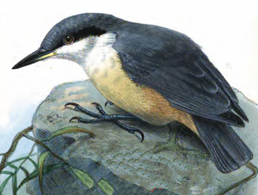 marked in original as Sitta rupicola, now Sitta neumayer rupicola [1]